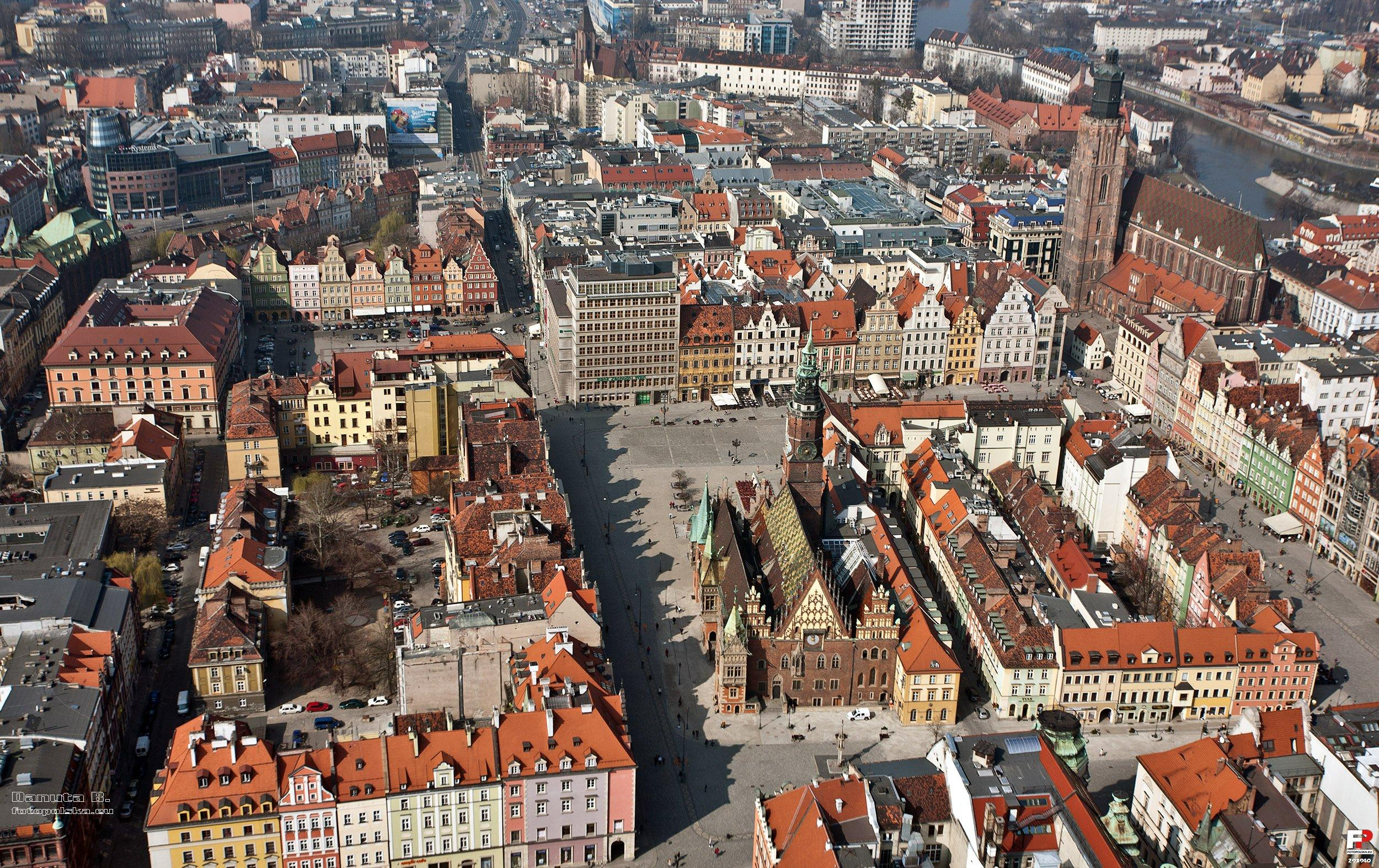 Foto-loto nad wrocławskim rynkiem. Dokładnie widać blok śródrynkowy z gotyckim ratuszem na czele.